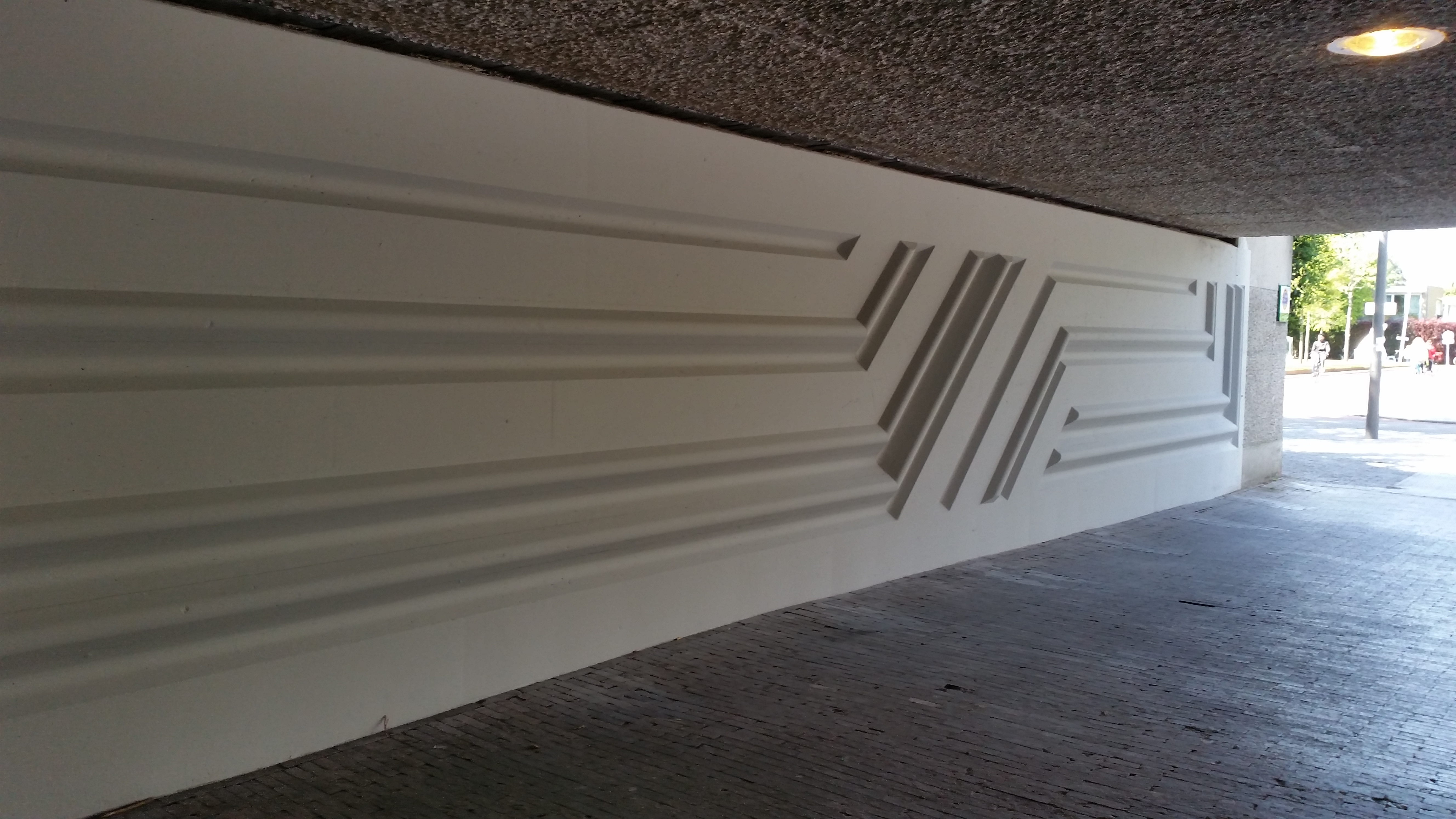 betonreliefs onder Brug 863 (in Amsterdam)